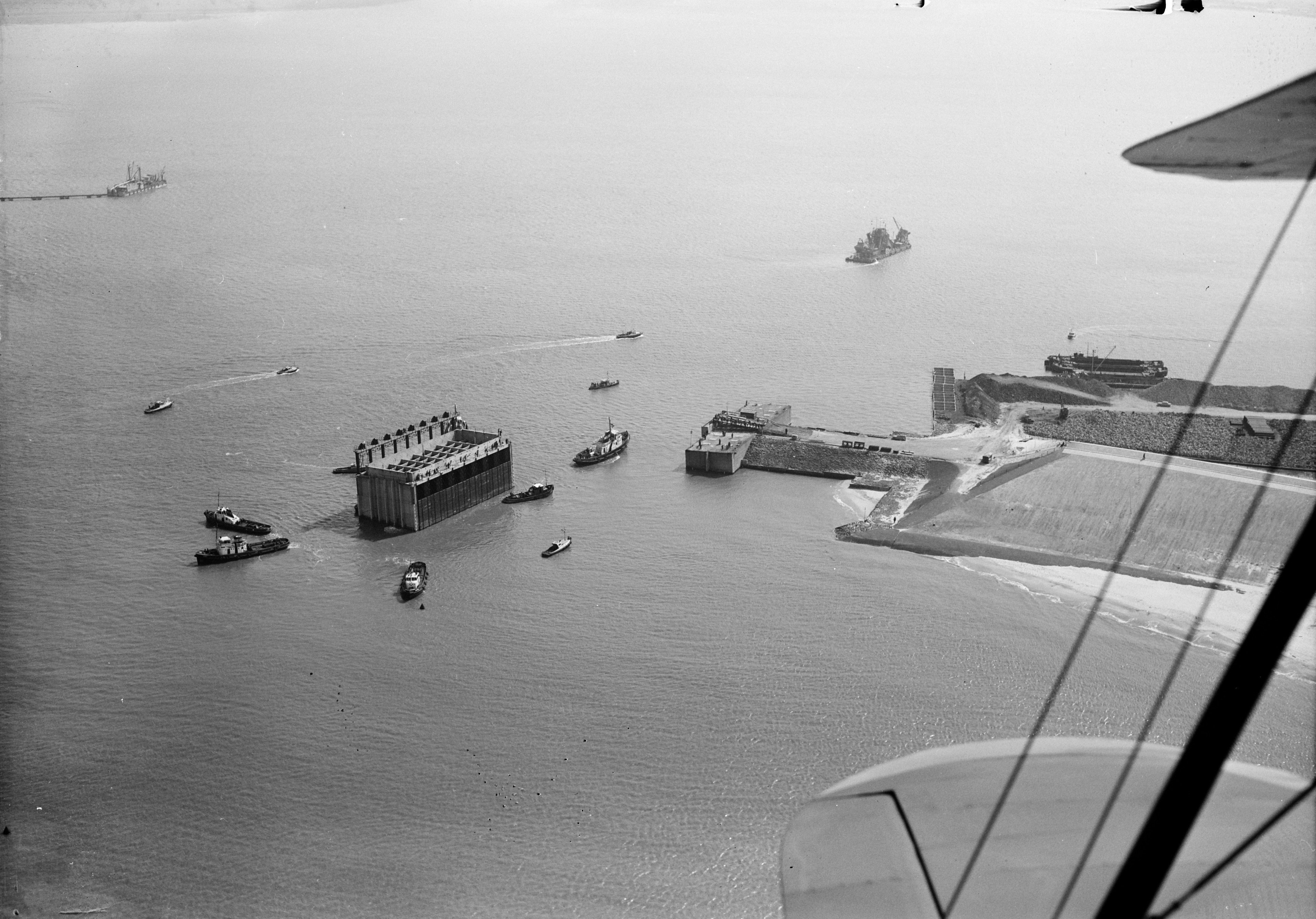 Collectie / Archief : Fotocollectie Anefo Reportage / Serie : [ onbekend ] Beschrijving : Invaren van caissons in het Veerse Gat . Luchtfotos Datum : 13 april 1961 Locatie : Veere, Veerse Gat, Zeeland Trefwoorden : CAISSONS Fotograaf : Slagboom, […] / Anefo Auteursrechthebbende : Nationaal Archief Materiaalsoort : Negatief (zwart/wit) Nummer archiefinventaris : bekijk toegang 2.24.01.03 Bestanddeelnummer : 912-3451